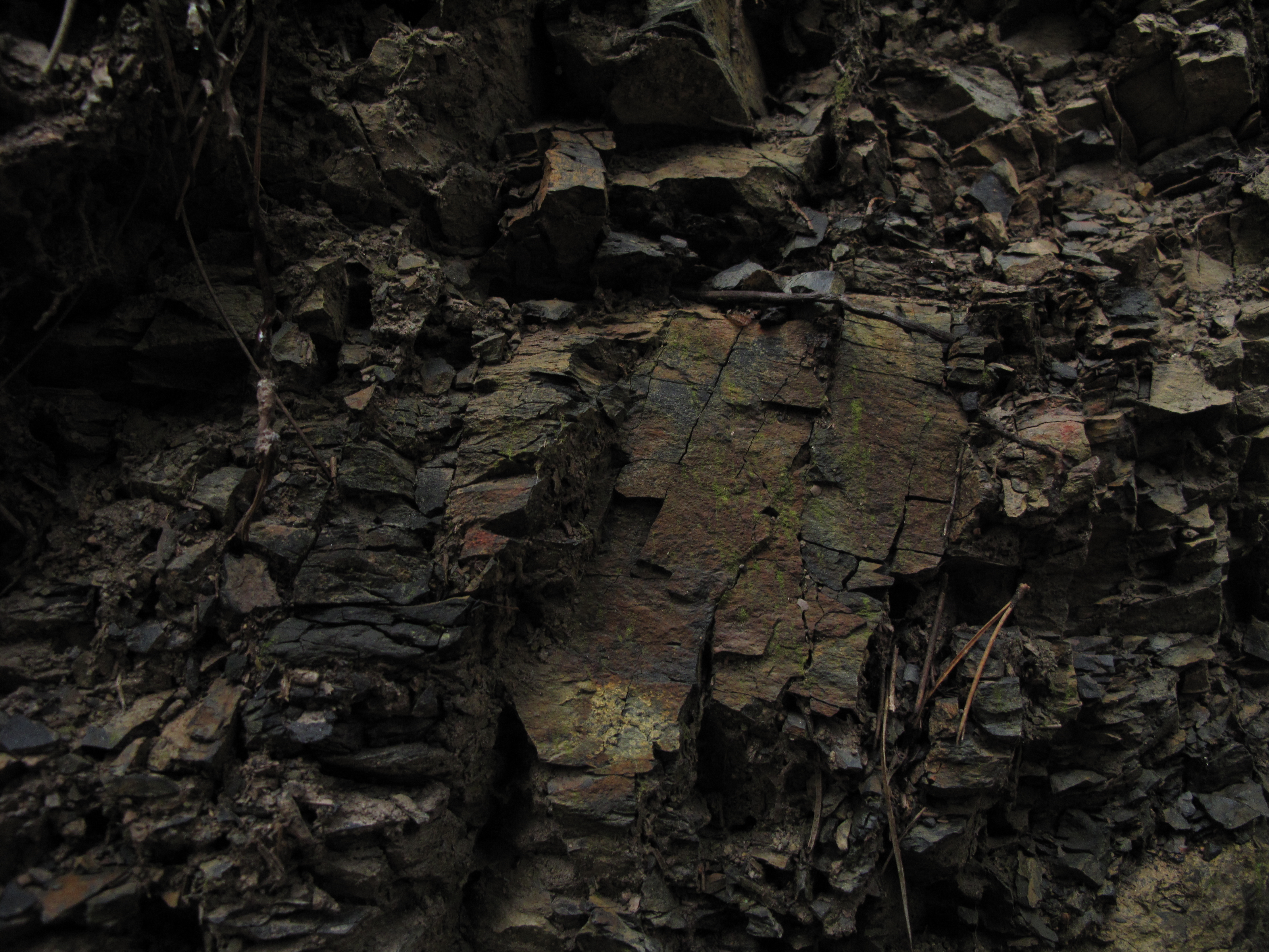 Přírodní památka Sutice. Okres Plzeň-město, Česká republika.